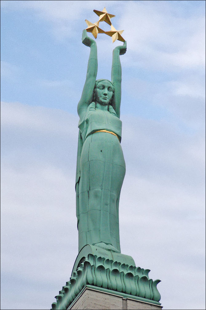 Milda, la Marianne lettone, soutient à bout de bras les étoiles symbolisant les trois régions de Lettonie Le monument de la liberté a été inauguré en 1935. Il symbolise la libération du peuple letton. C'est le sculpteur letton Karlis Zale (1888- 1942) qui a conçu le monument. La figure de la liberté mesure 9 m de haut, elle est placée sur un socle prolongé par une colonne de 42 m dans la perspective du plus grand boulevard de Riga : Brivibas Iela.